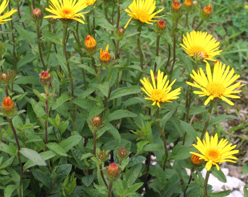 Inula_hirta (Enula scabra) Località : Giardino Botanico Alpino "Giangio Lorenzoni", Pian Cansiglio, Tambre d'Alpago (BL), 1000 m s.l.m.